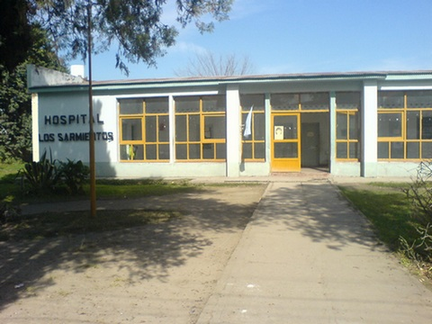 Entrada principal hacia las salas.